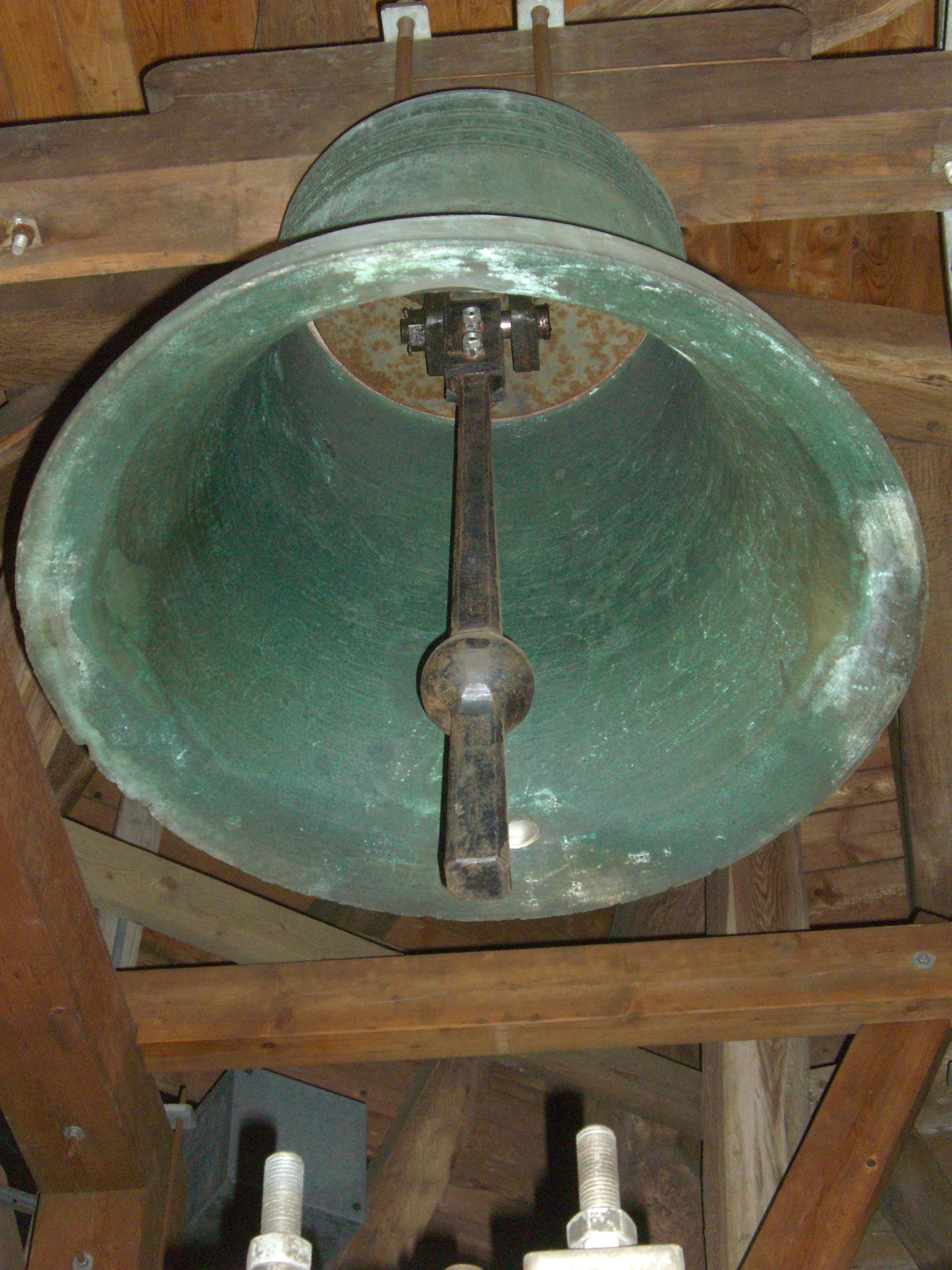 Die Glocke von 1725, die älteste der heutigen Glocken, im Kirchturm der Evangelisch-reformierten Kirche in Wölfersheim. Mit freundlicher Genehmigung der Kirchengemeinde.